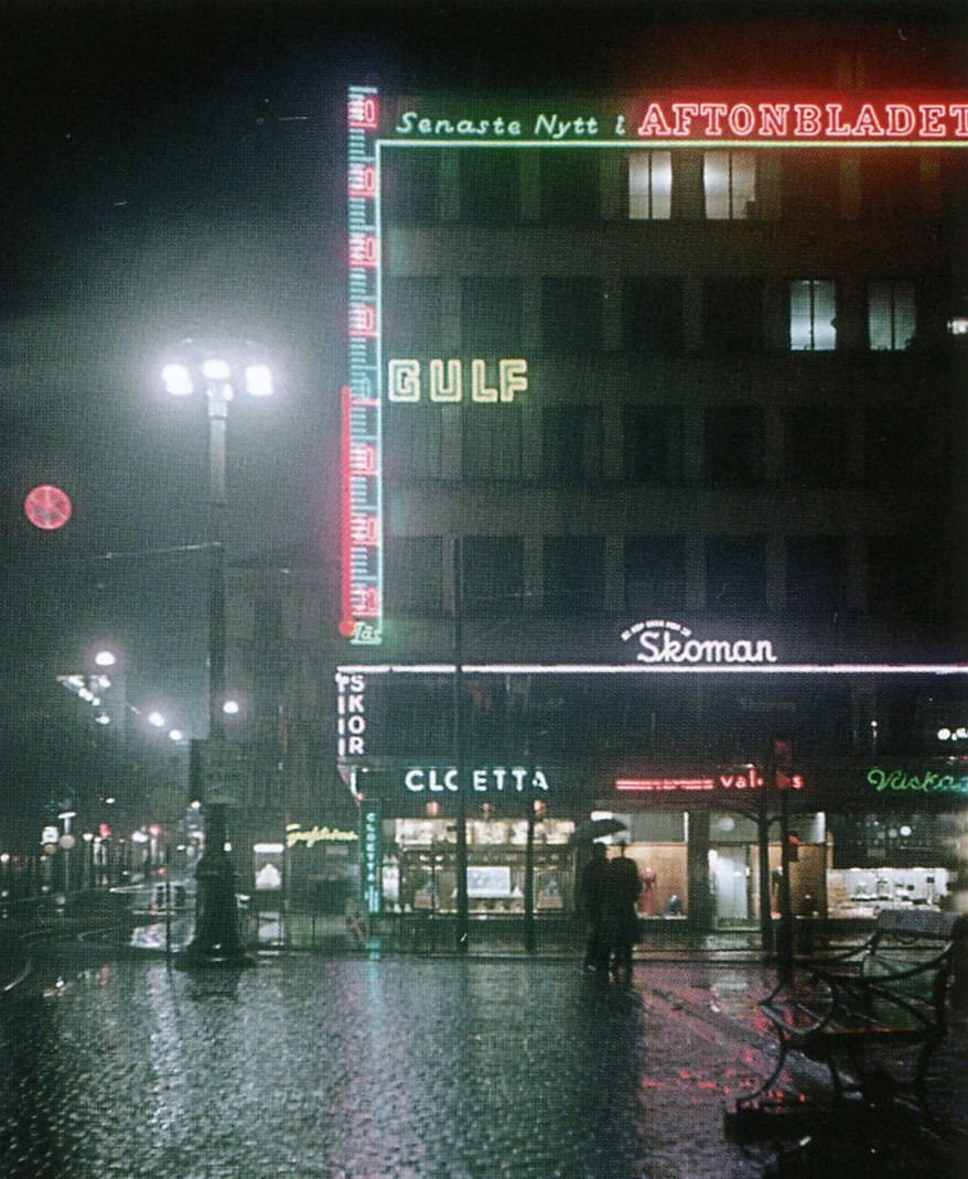 Aftonbladets jättetermometer på Cityplalatset i Stockholm